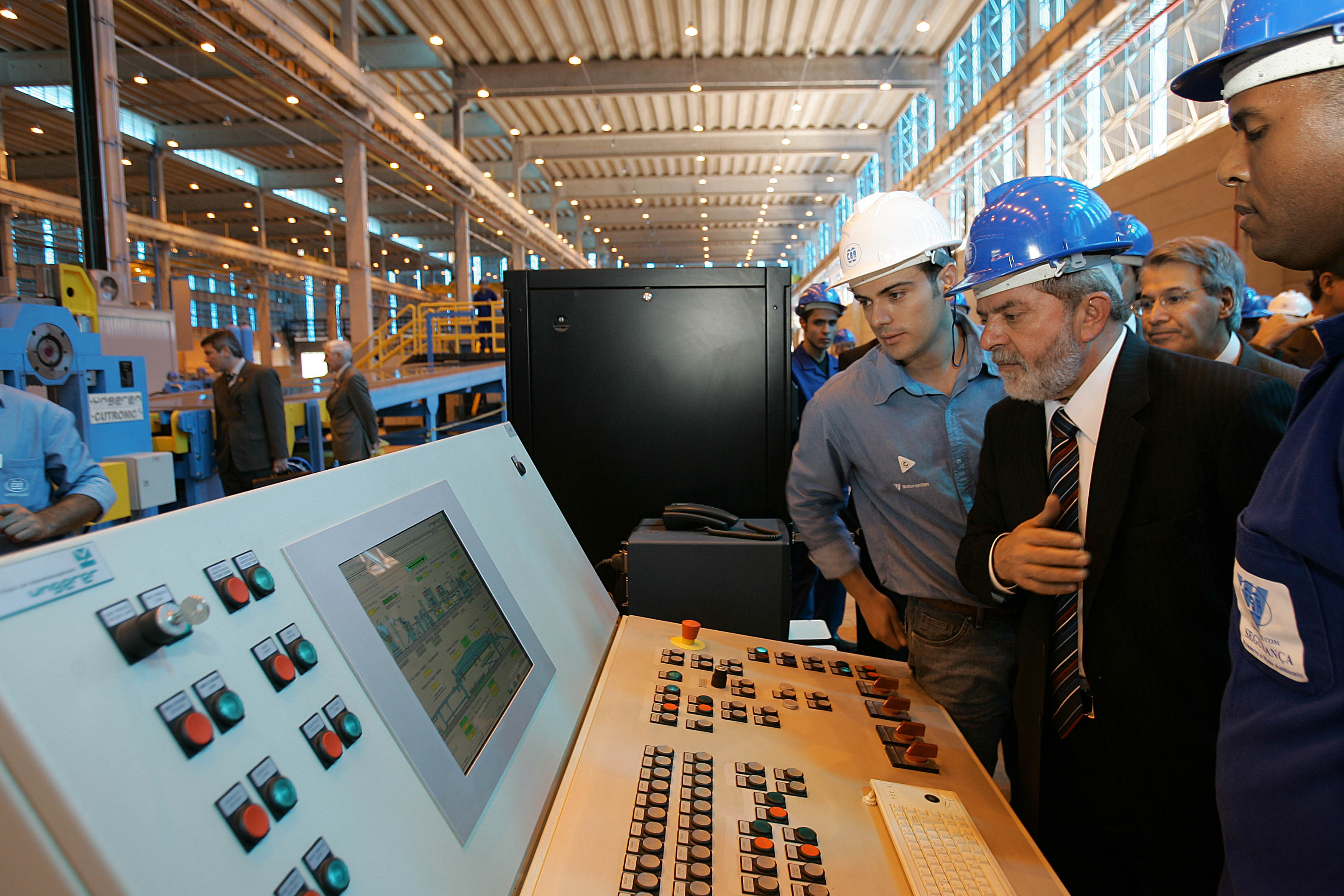 Alumínio / SP - a fábrica da Companhia Brasileira de Alumínio, acompanhado por funcionários da empresa.